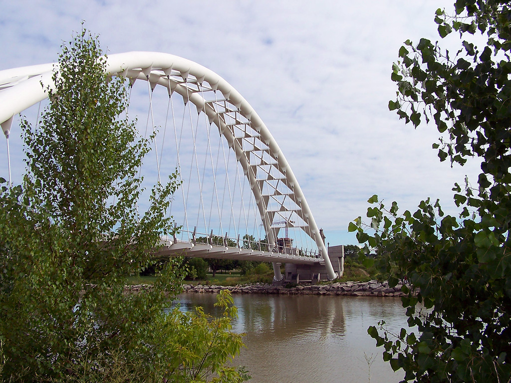 Não sei o nome dessa ponte, mas ela é bem interessante, pena que não tem uma iluminação a altura, senão renderia umas belas nightshots... Boa tarde e abraços a todos.